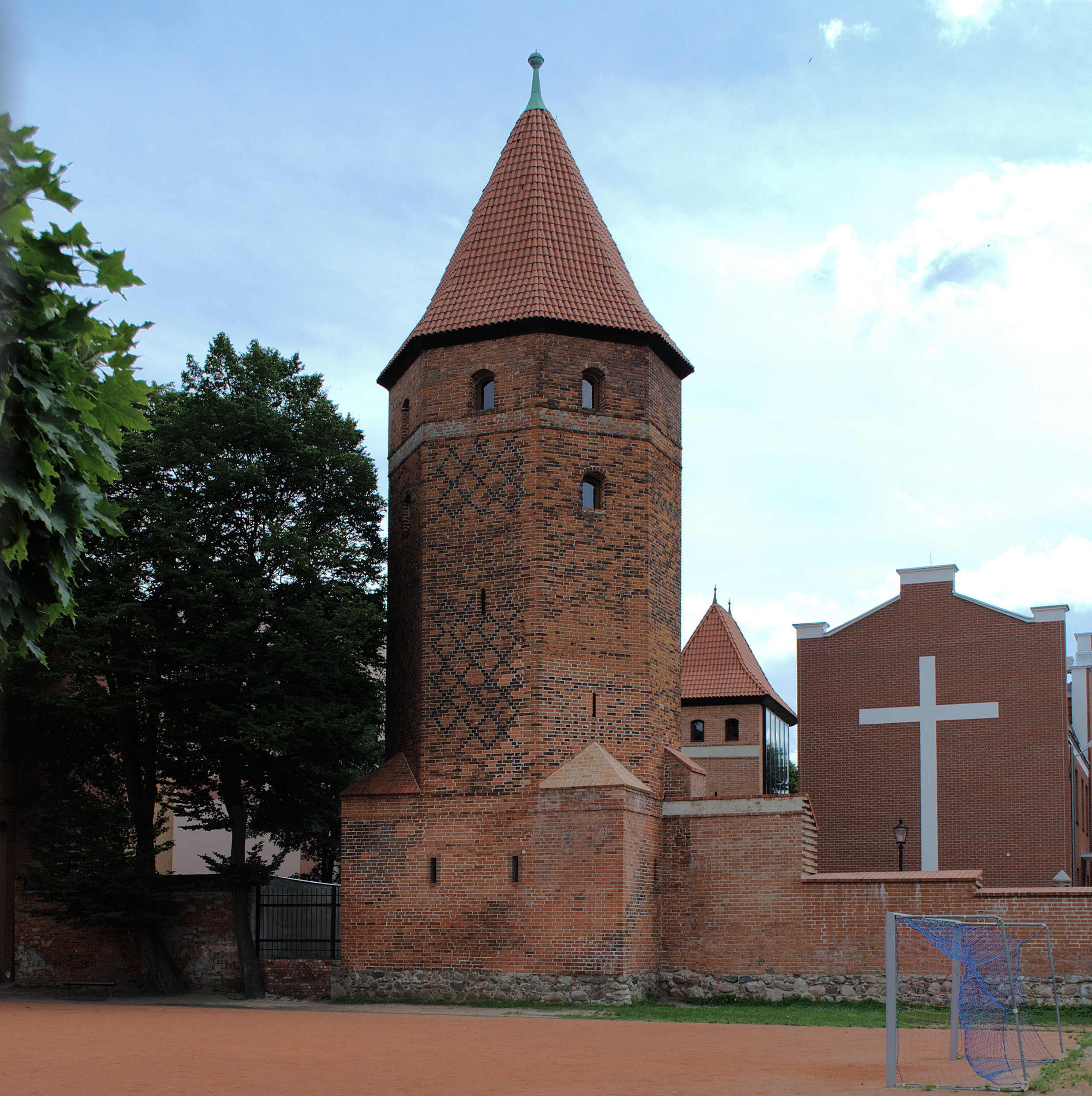 Lębork. Baszta Bluszczowa widziana z alei Wolności.